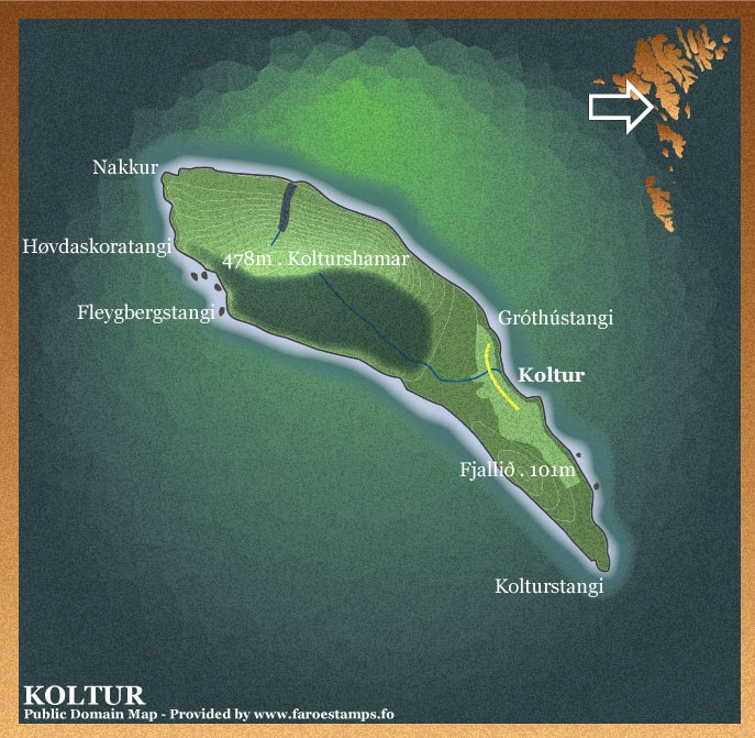 Koltur, Faroe Islands